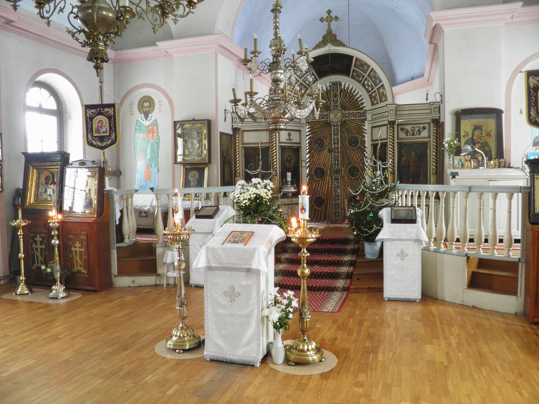 церковный алтарь